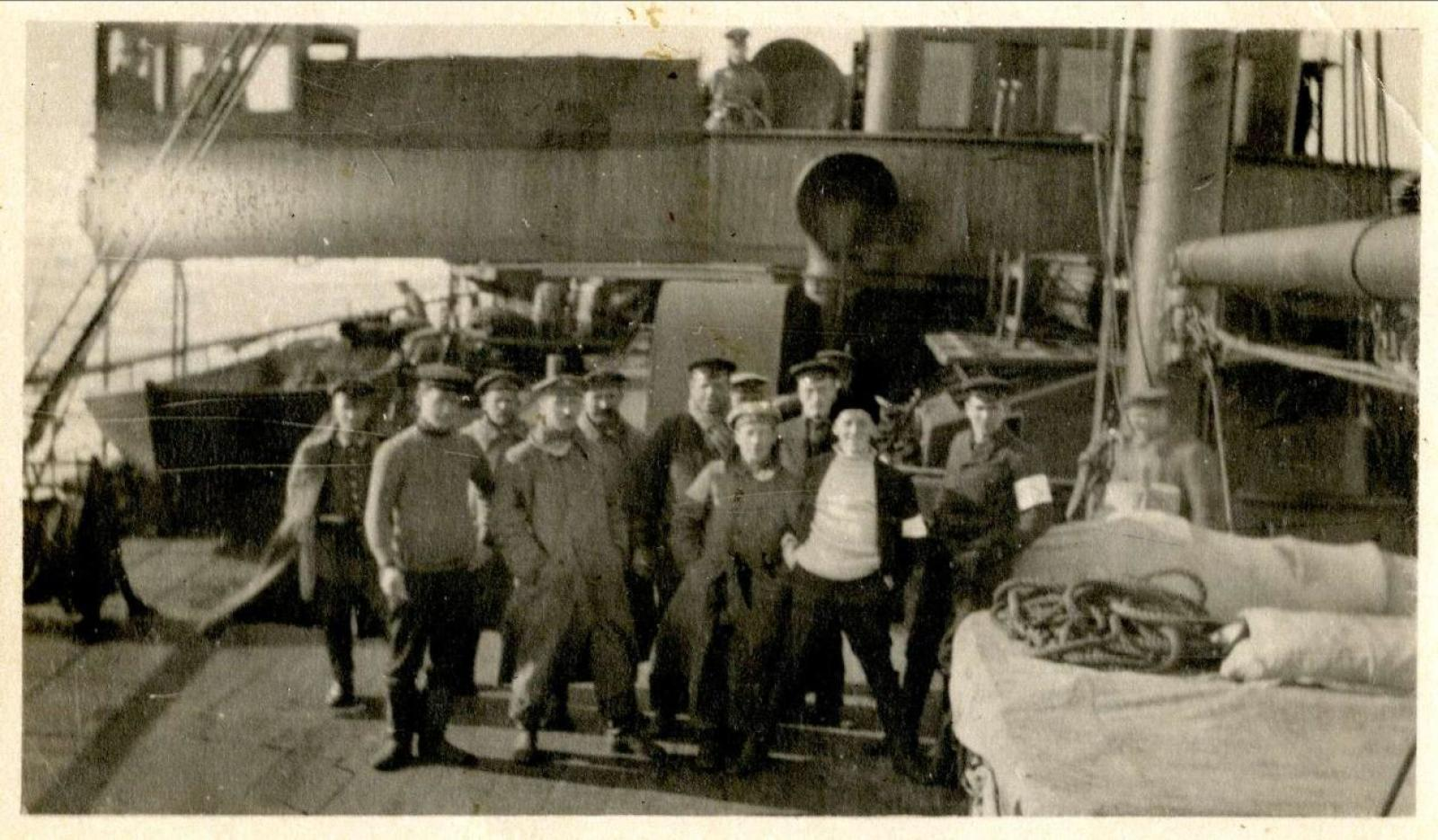 Suojeluskuntalaisia Volynetšin kannella vuonna 1918 kaappauksen jälkeen.